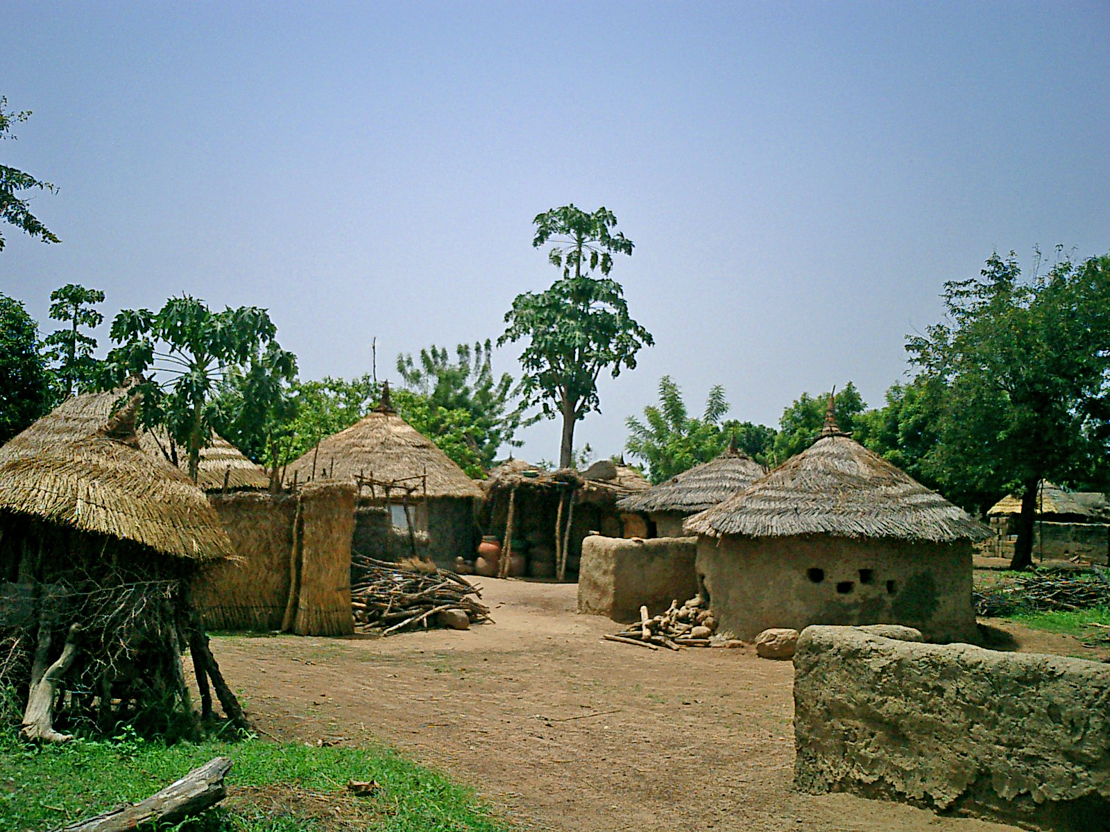 Burkina Faso: Traditionelles Gehöft in Dourtenga